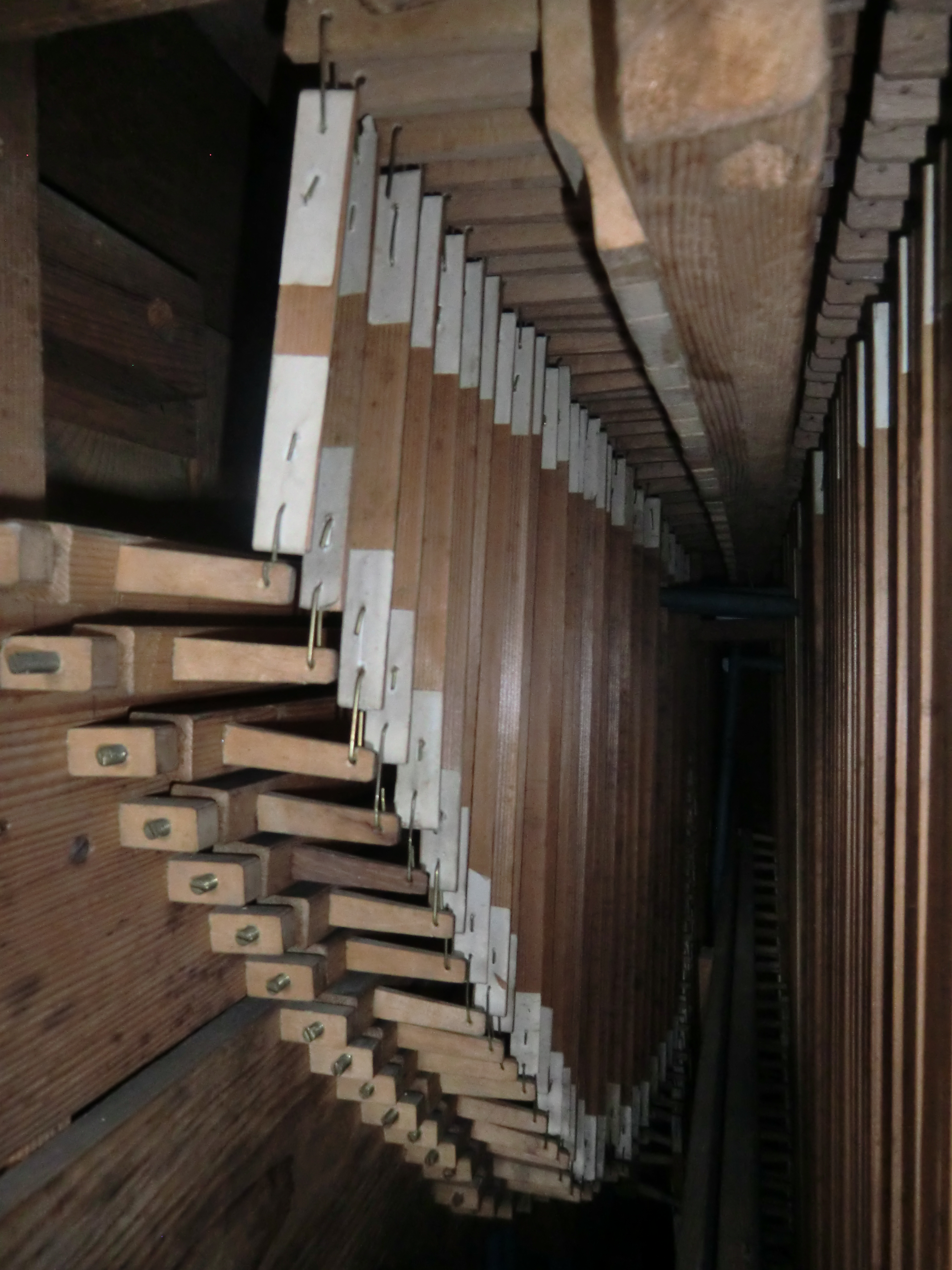 Keller-Orgel Kransberg (1876) - mechanische Hängeventillade (Wellenbrett hinten am Prospekt, Trakturführung für Haupt- und Nebenwerk)